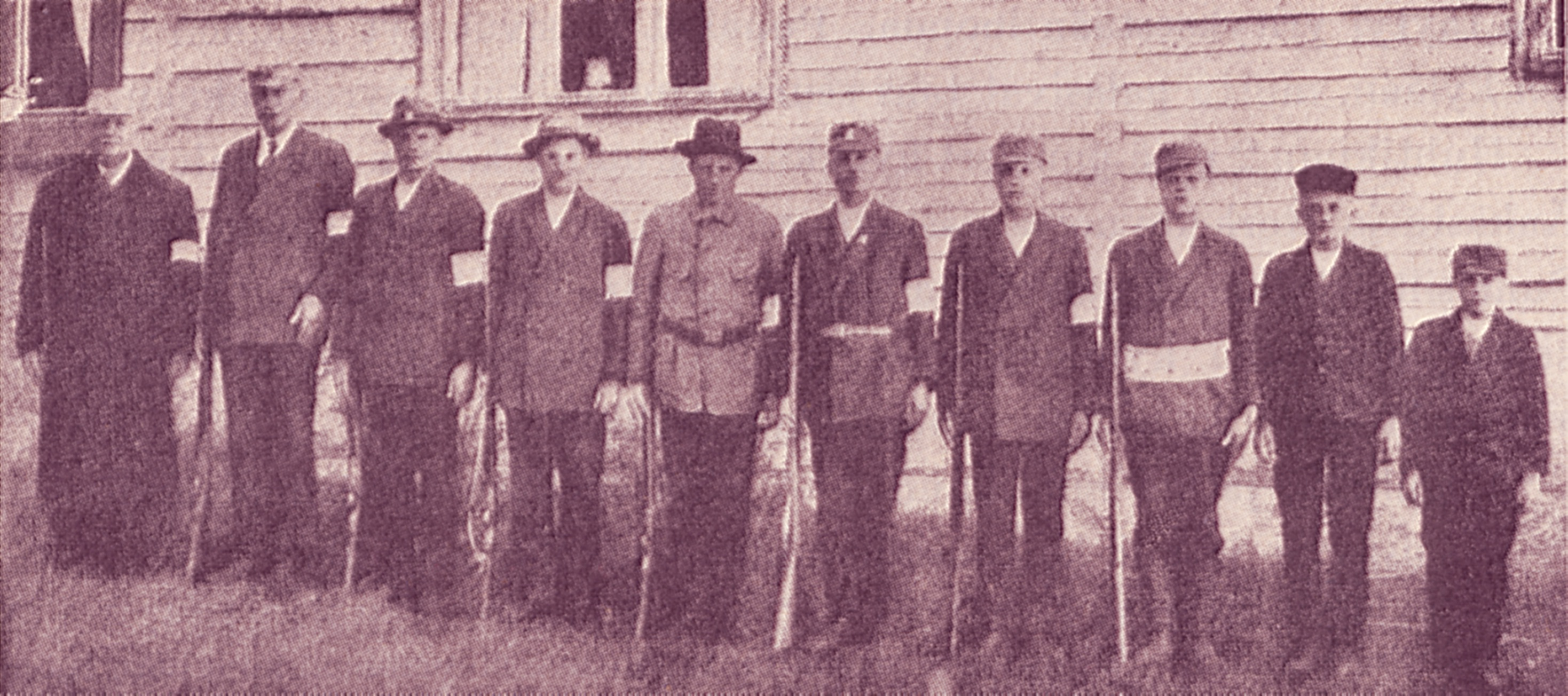 Description